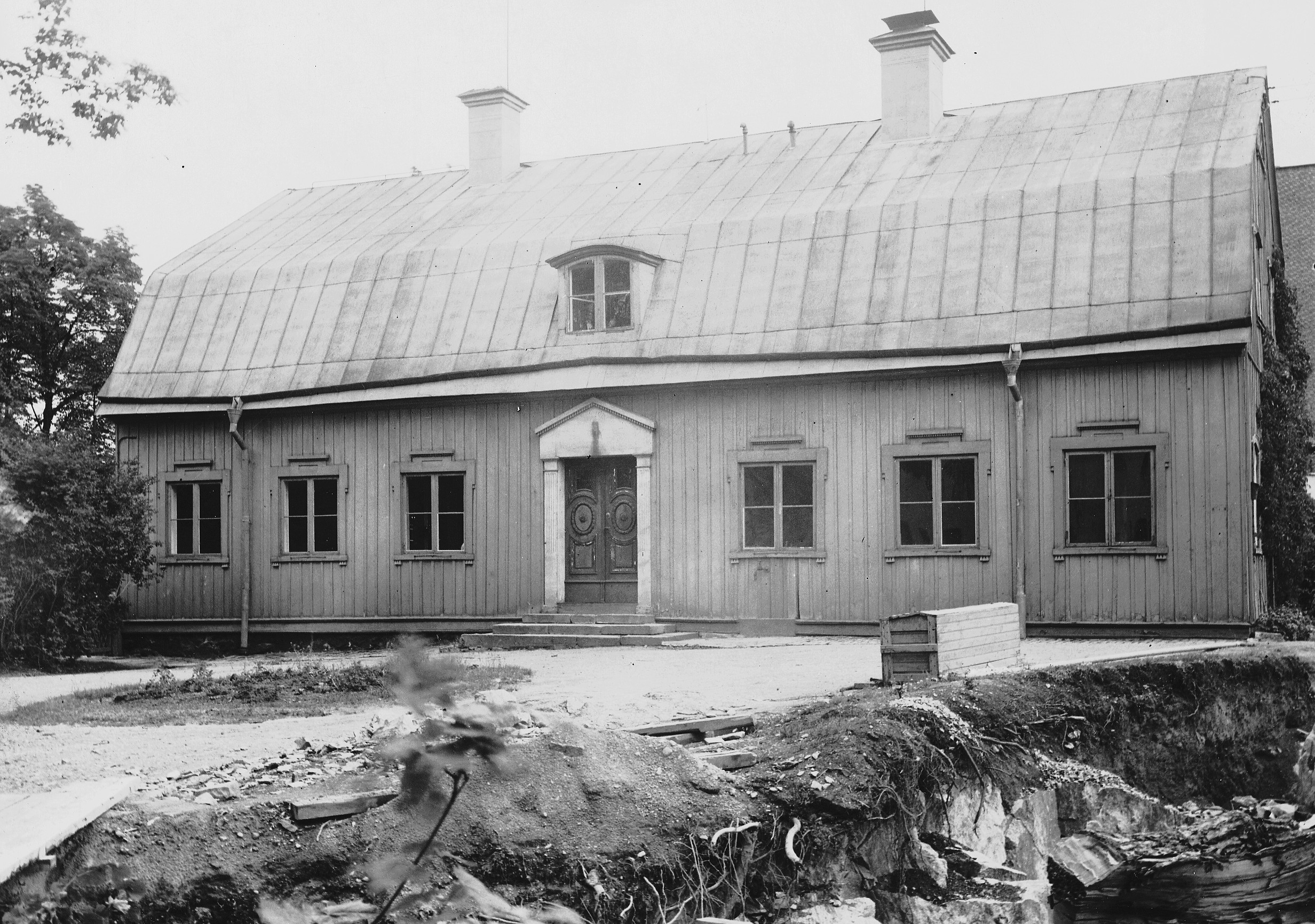 Malmgården Hedvigsberg på Kungsholmen